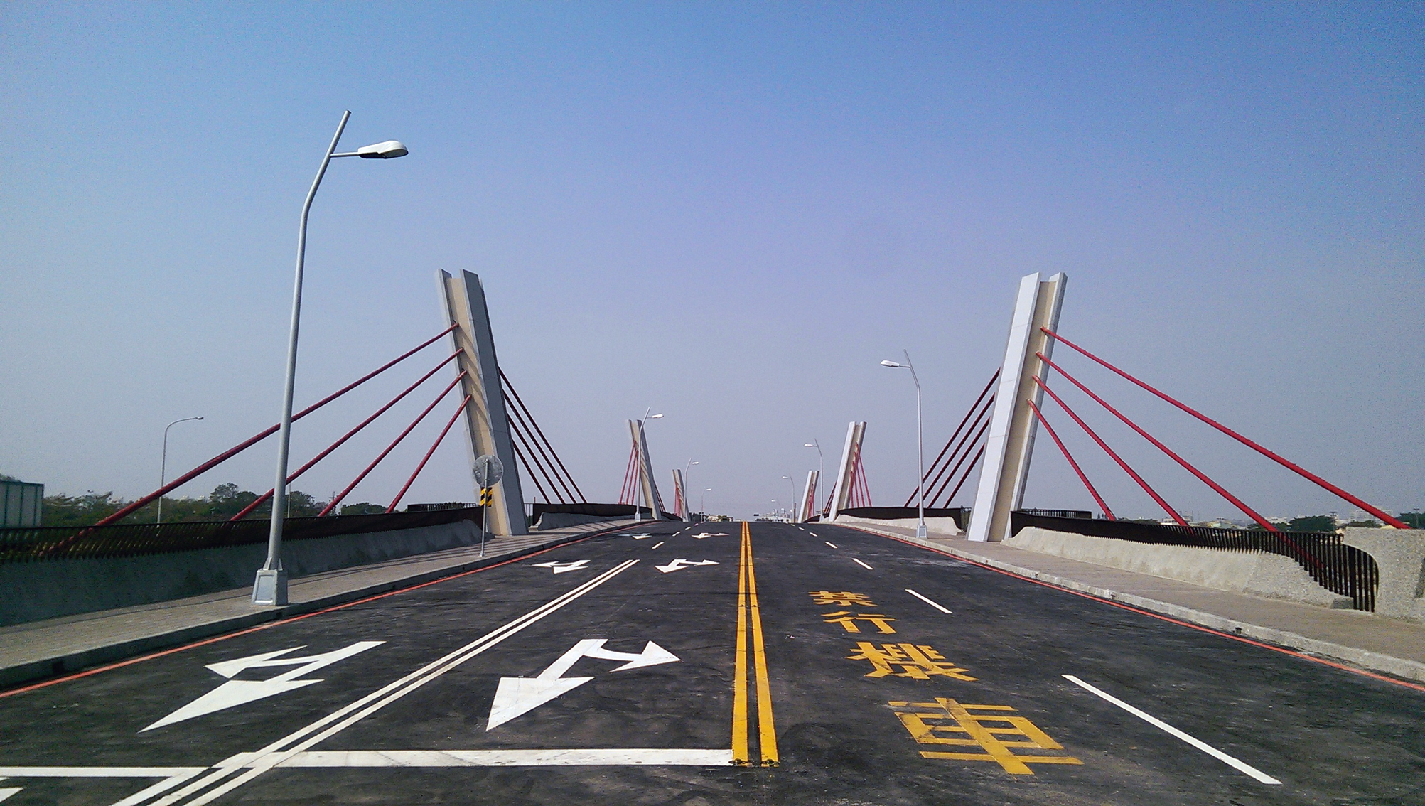 中文（台灣）: 光興隆大橋新橋